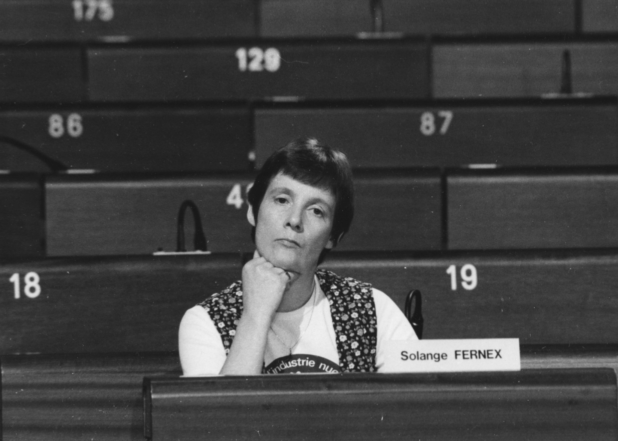 Solange Fernex,dans l’hémicycle du Conseil de l’Europe à Strasbourg en 1979. Solange Fernex (née Solange de Turckheim) est une pacifiste et femme politique française, née le 15 avril 1934 à Strasbourg dans le Bas-Rhin (Alsace), décédée le 11 septembre 2006 d'un cancer, dans le domaine familial de Biederthal, non loin de la frontière suisse.